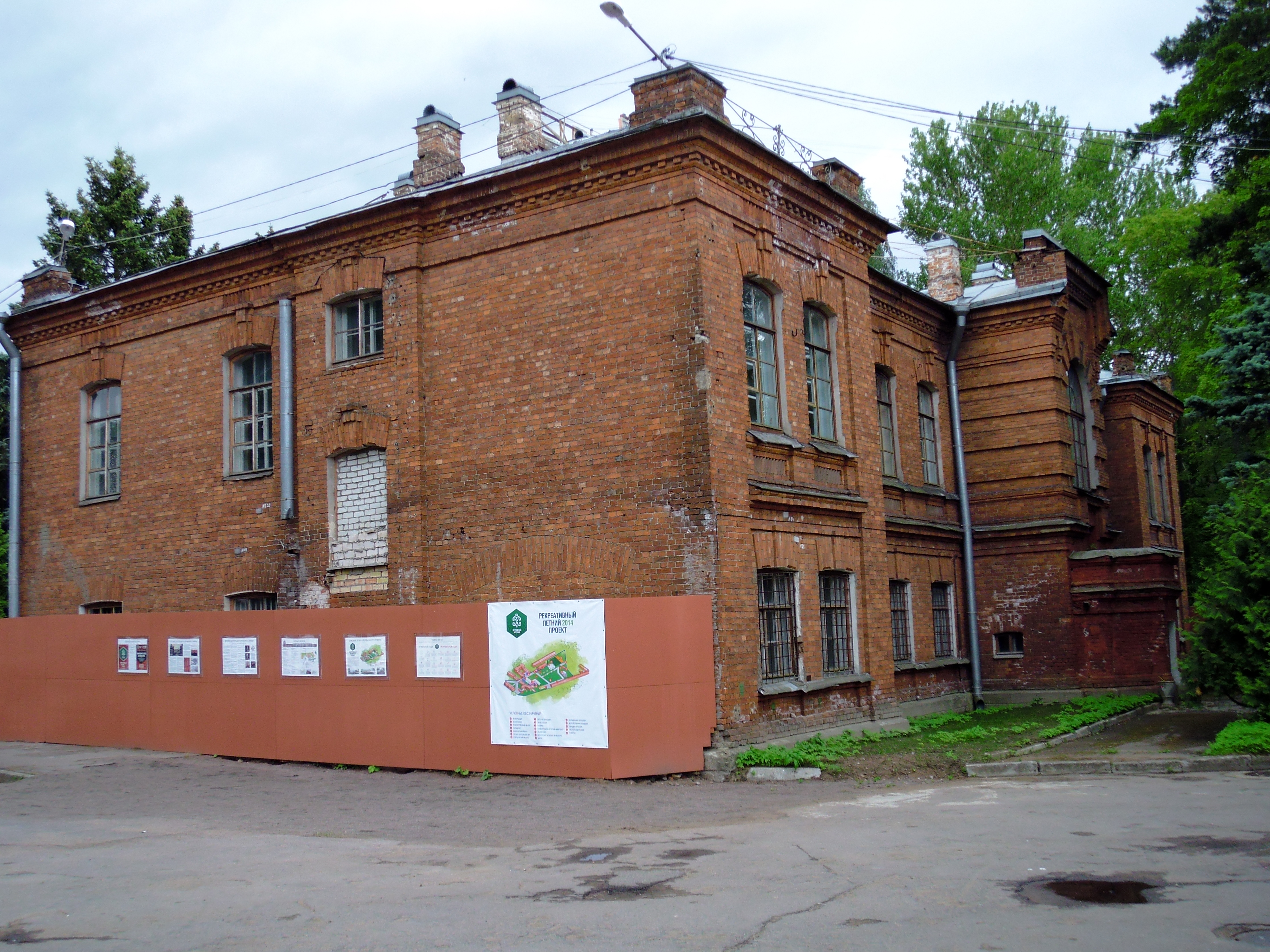 Сестрорецк СПб. Петровский Арсенал. Здание администрации в 2014 году, памятник промышленной архитектуры, находится под охраной КГИОП СПб.